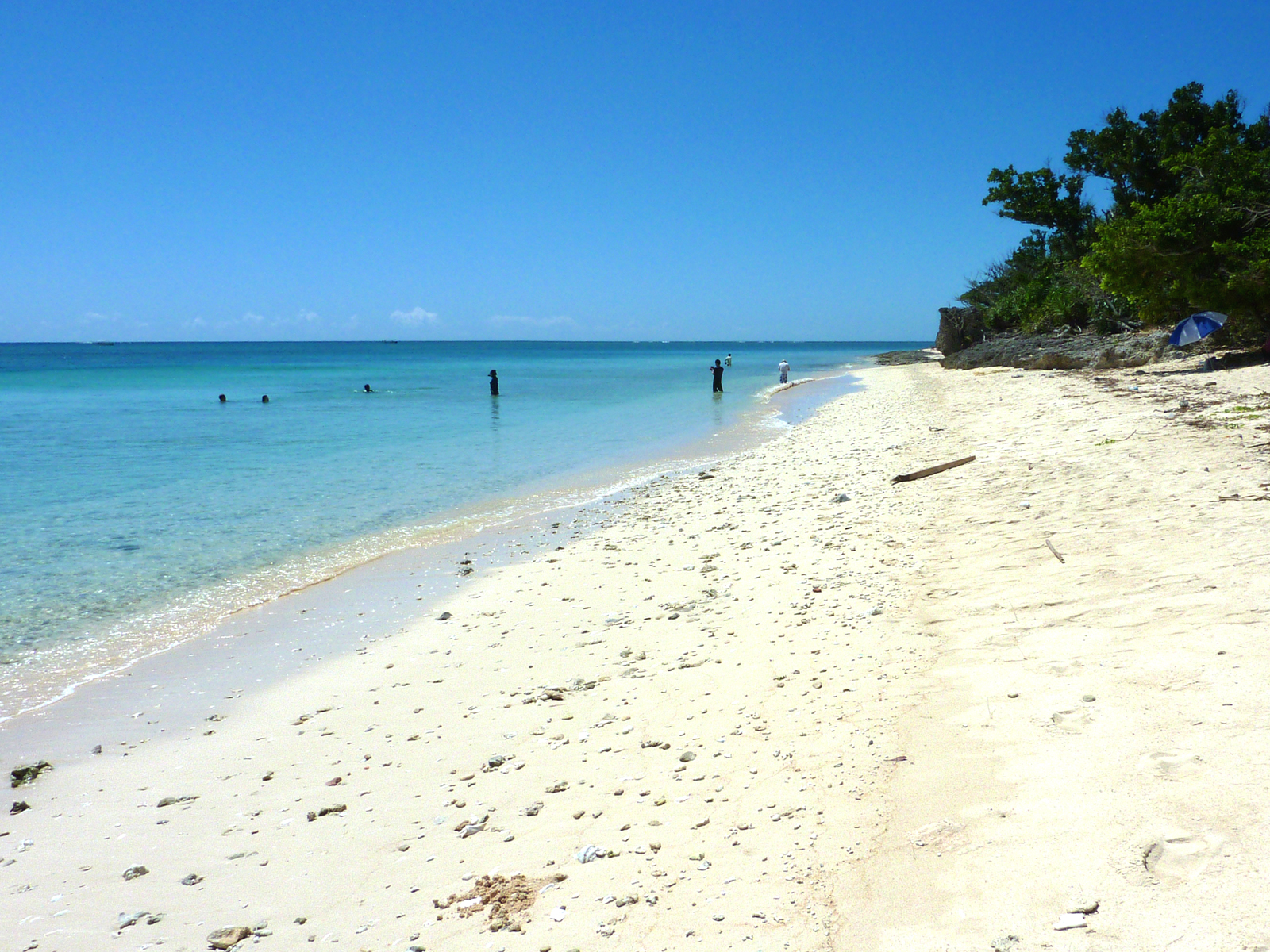 屋良浜（沖縄県八重山郡竹富町鳩間島）